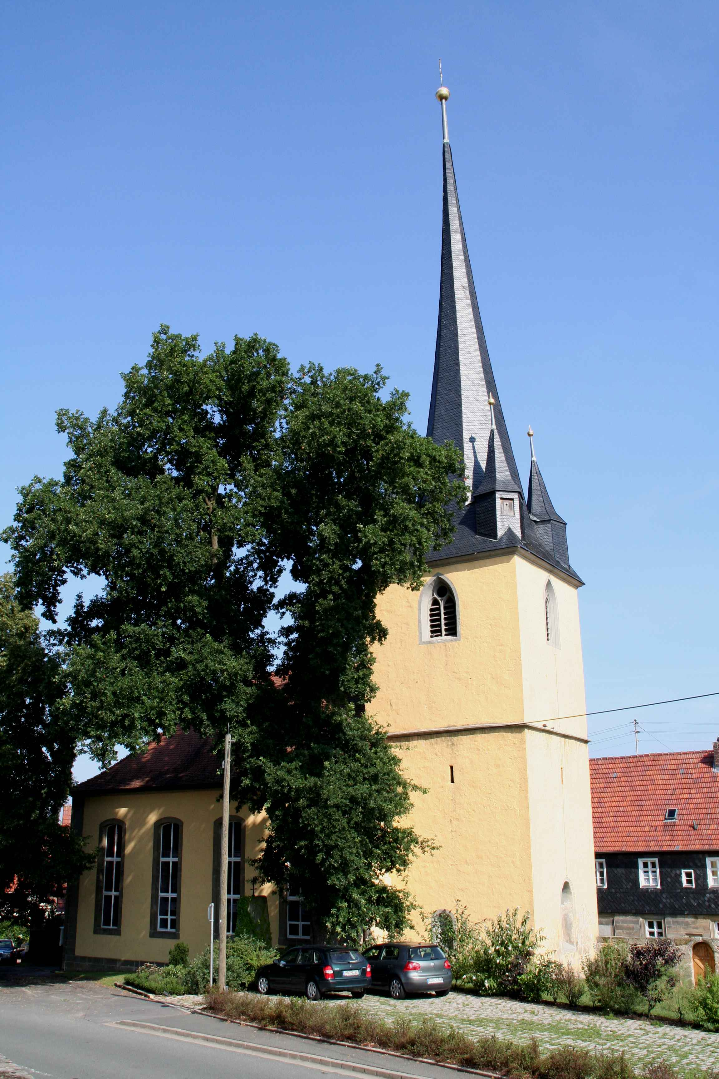 ev. Kirche Gleußen evangelische Stadtkirche in Gleußen, OT von Itzgrund, Landkreis Coburg